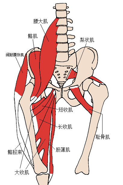 髋前肌